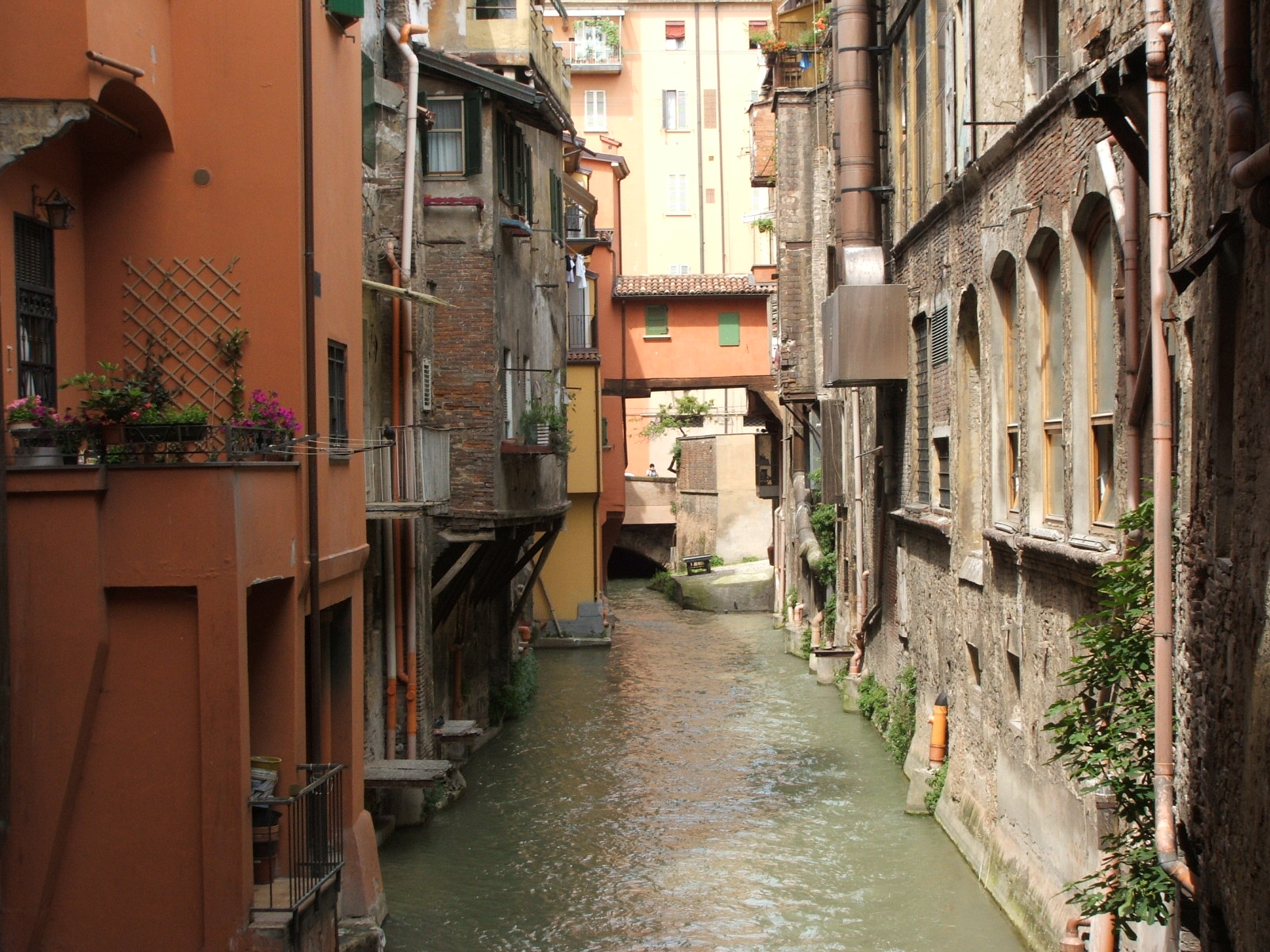 Bologna, maggio 2006 Bologna, il canale delle Moline (oltre la "Finestrella")